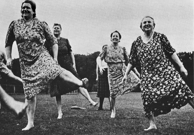 Husmorsgymnastik